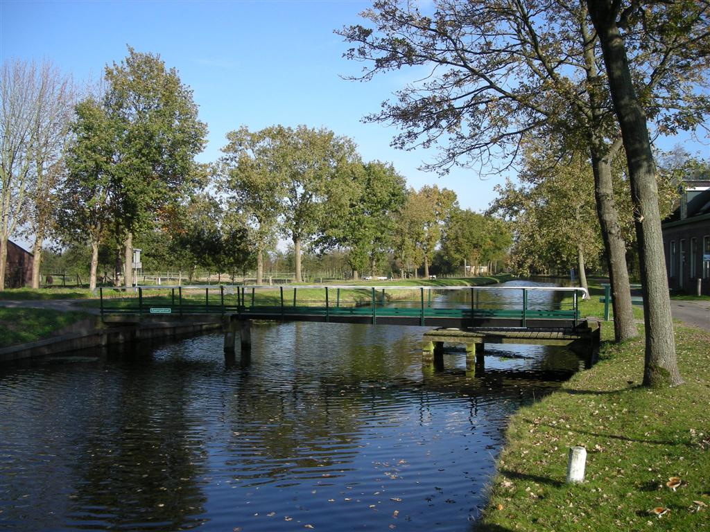 Opsterlandse Compagnonsvaart bij Haneburen, Friesland.